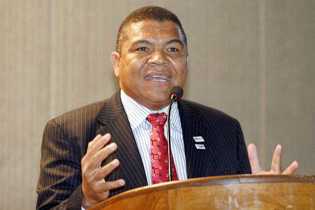 Valmir Assunção - secretário estadual de Desenvolvimento Social e Combate à Pobreza.